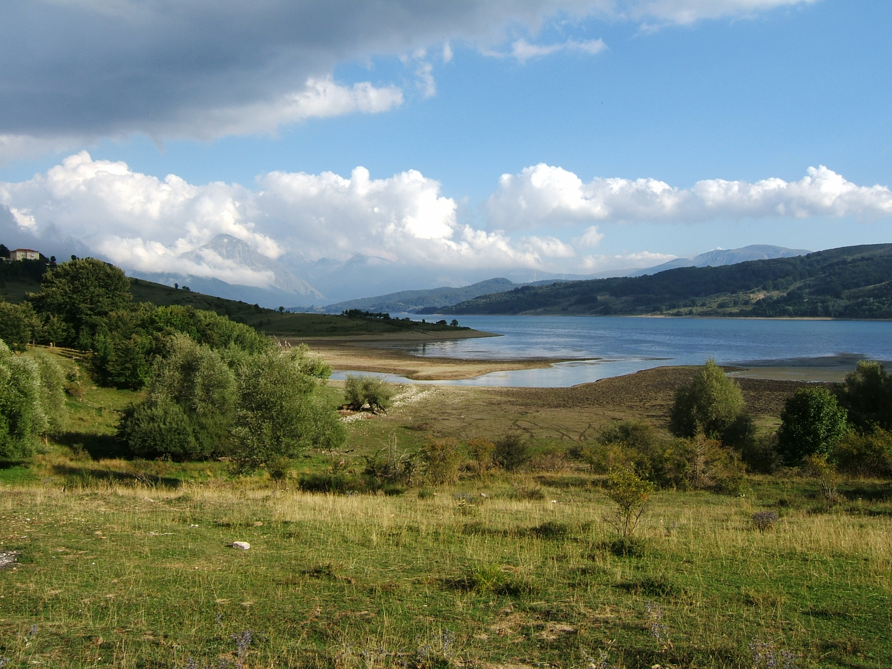 Lago di Campotosto, con il Gran Sasso sullo sfondo